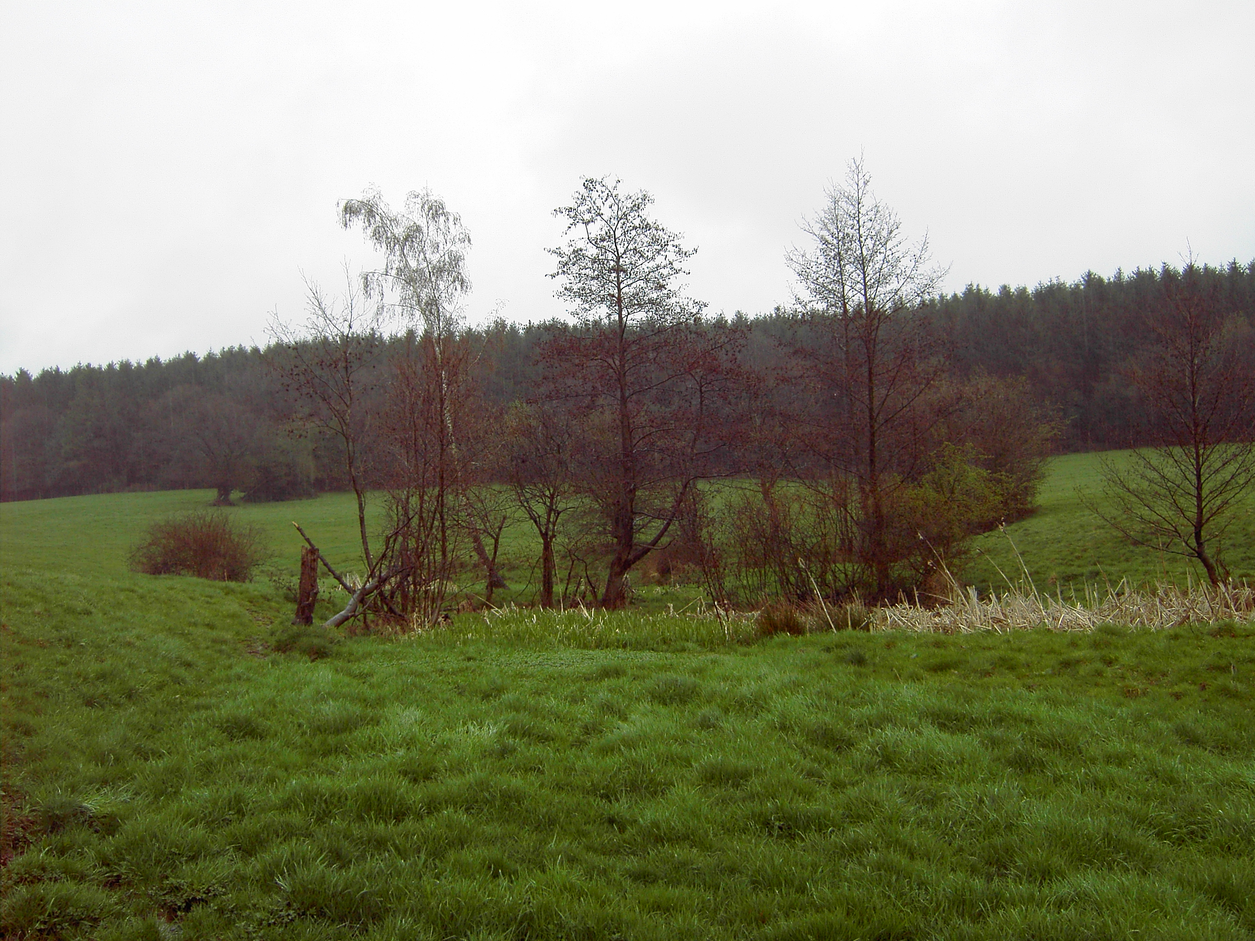 Blick ins Naturschutzgebiet „Horstbend-Mausbachquelle“ in Stolberg, NRW